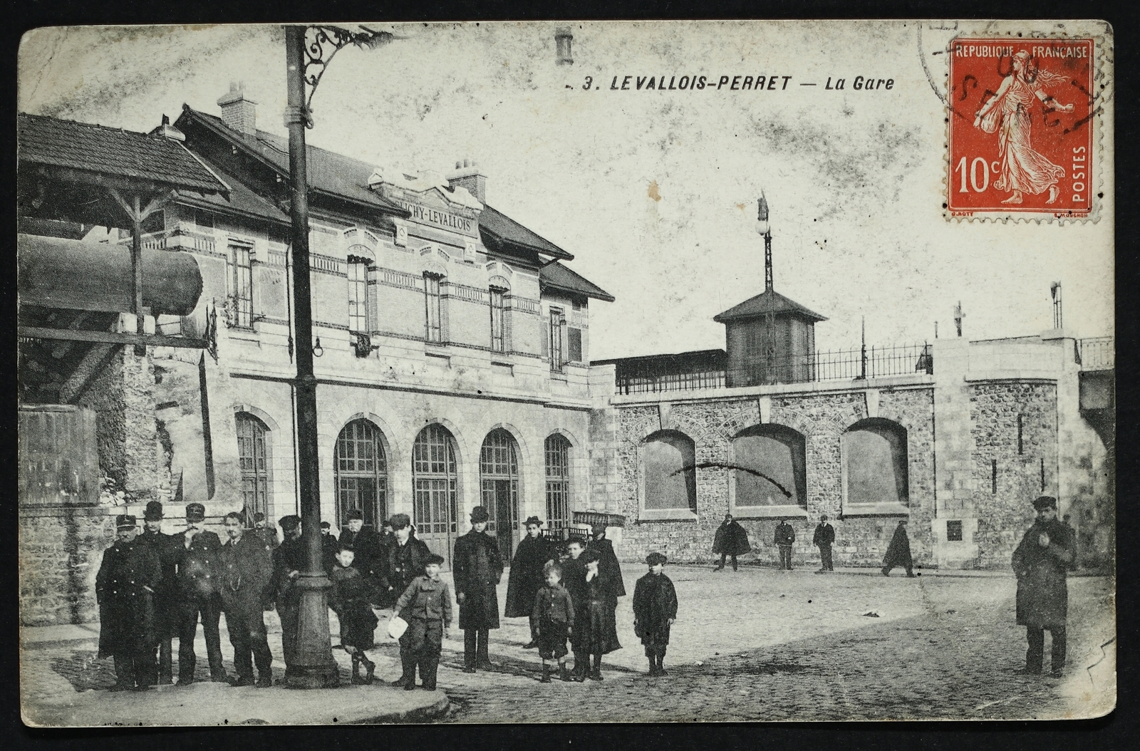 Levallois-Perret.Gare